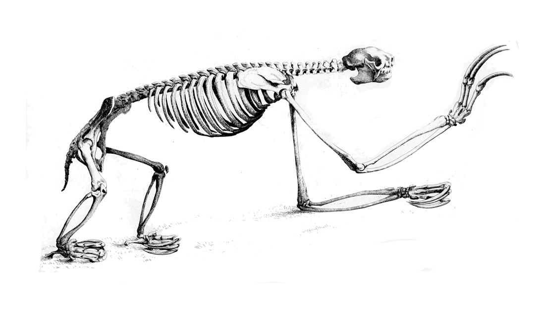 Bradypus tridactylus skull